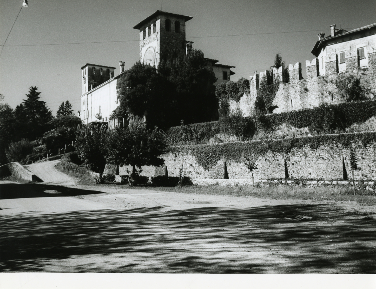 Colloredo di Monte Albano. Luoghi di Ippolito Nievo. Castello con torre con orologio. Vedute scorciate dal basso dai giardinia terrazza. Piazza. Varmo. Gradiscutta. Vecchio mulino. Servizio fotografico : Varmo, 1967 / Paolo Monti. - Stampe: 6 : Positivo b/n, gelatina bromuro d'argento/ carta, 24x30. - ((Al verso delle stampe manoscritti i numeri dei negativi corrispondenti (formato 35 mm) con indicazione del fotogramma: 422/19, 422/43, 422/53, 423/17, 423/31, 423/43; iscrizioni didascaliche manoscritte a matita; timbro a inchiostro con copyright (Corso Sempione - Milano). - Sul coperchio della scatola iscrizione didascalica manoscritta a pennarello nero: ""Architettura/ Lombardia Veneto". - Occasione: Documentazione per la pubblicazione: Cecchi Emilio, Sapegno Natalino (a cura di), "Storia della Letteratura Italiana", 9 voll., Milano, Garzanti, 1966 e segg. - Agenda di Paolo Monti: Monti/ 3 aprile 1966 - 9 marzo 1971/ 12421-16823 (1966-1971), presso Archivio Paolo Monti. - Fonte: Monografia di Cecchi Emilio, Sapegno Natalino (a cura di): Storia della Letteratura Italiana, 9 voll., Milano, Garzanti (1966 e segg.). - Fonte